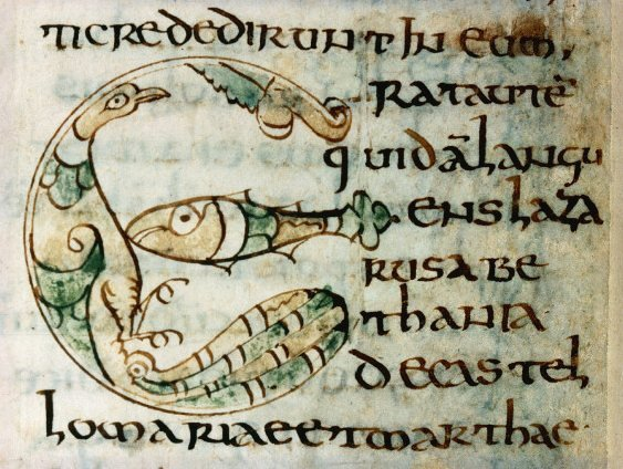 Initiale E. F° 175v. Autun, Bibliothèque Municipale. Ms 3.